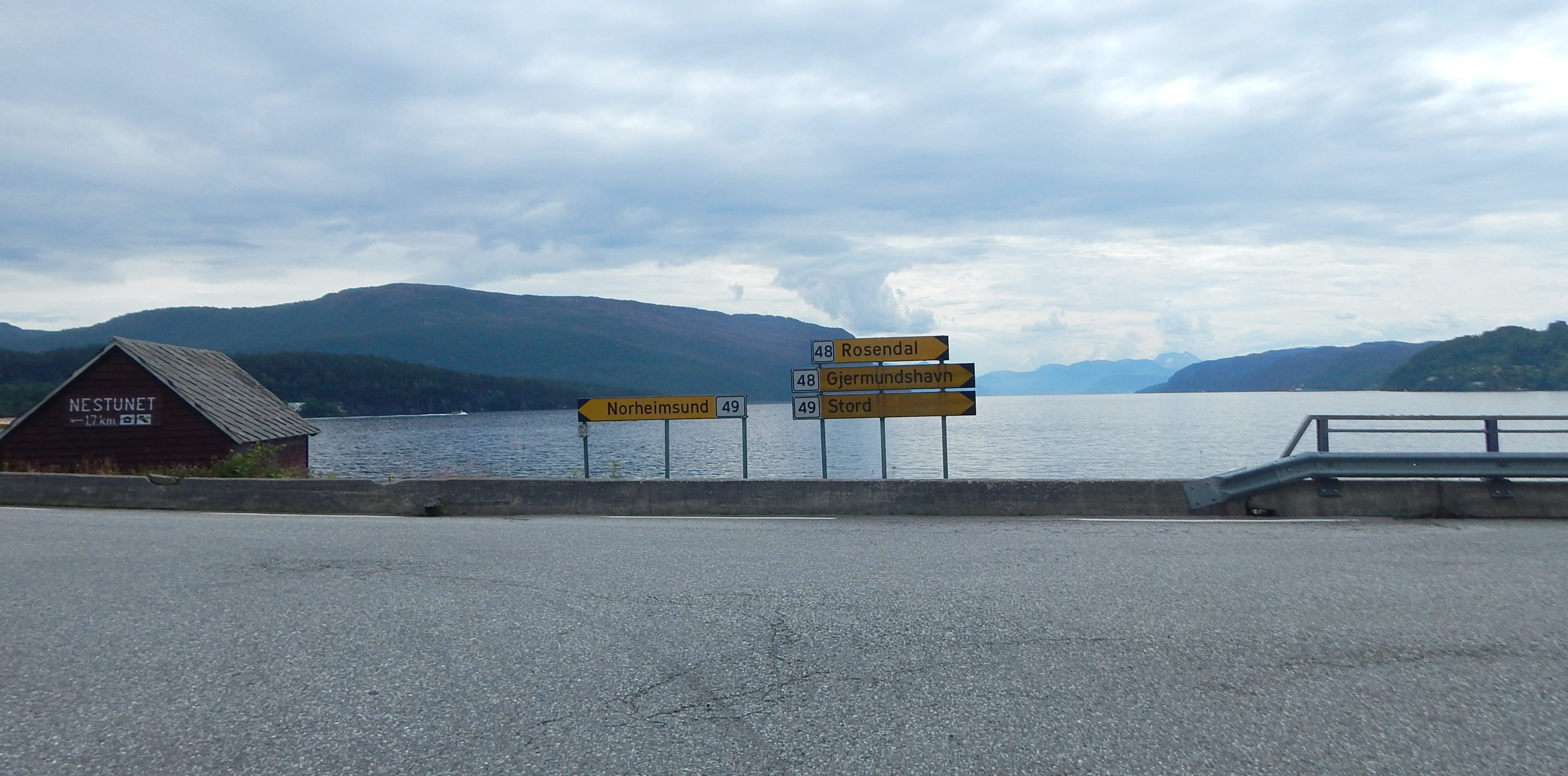 Veikryss i Mundheim. Sørover fra Mundheim hadde fylkesvei 49 felles strekning med fylkesvei 48. Fra 2020 er fylkesvei 49 omdefinert, og strekningen nordøstover til Tørvikbygd er nå fylkesvei 576.